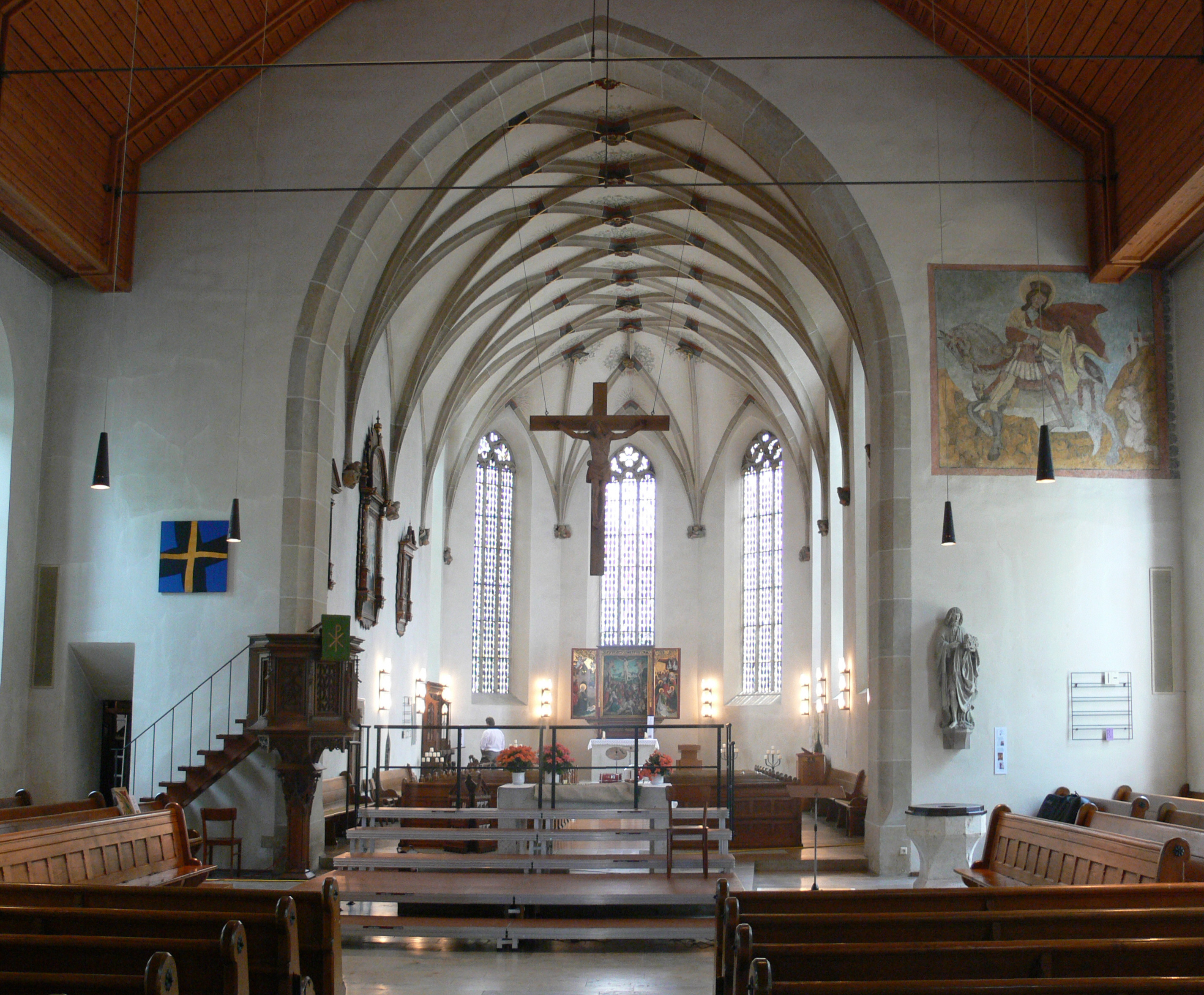 Blaubeuren, Stadtkirche, Innenansicht